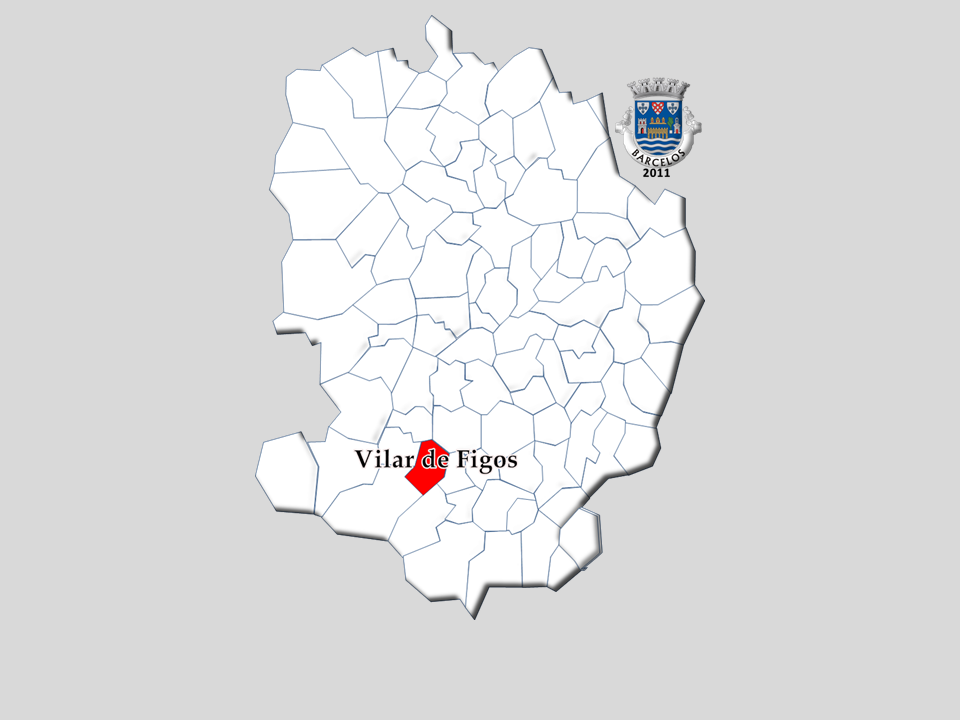 Censos 1864/2011